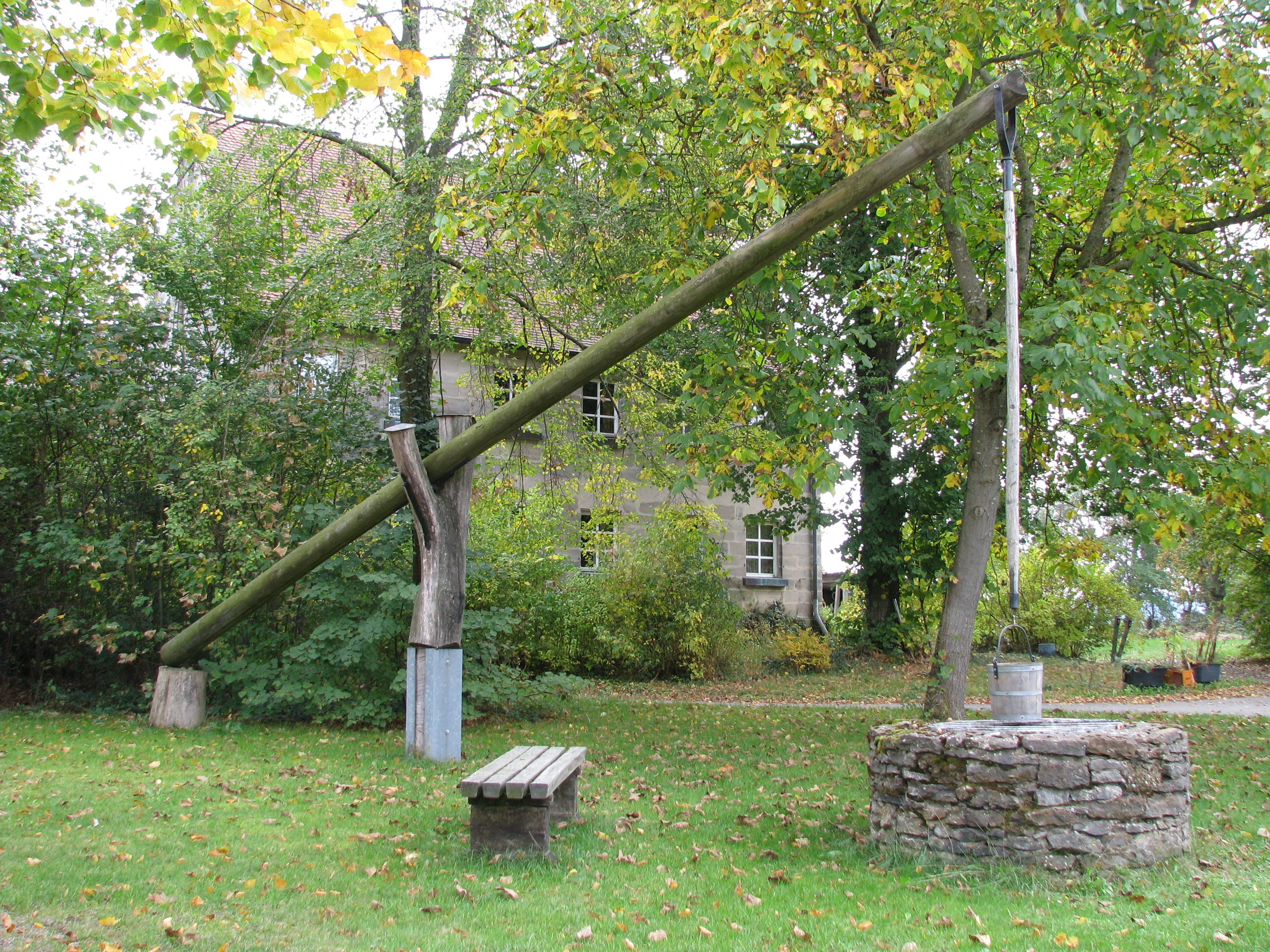 Rudletzholz, Gemeindeteil von Heideck im mittelfränkischen Landkreis Roth, Ziehbrunnen im Dorf